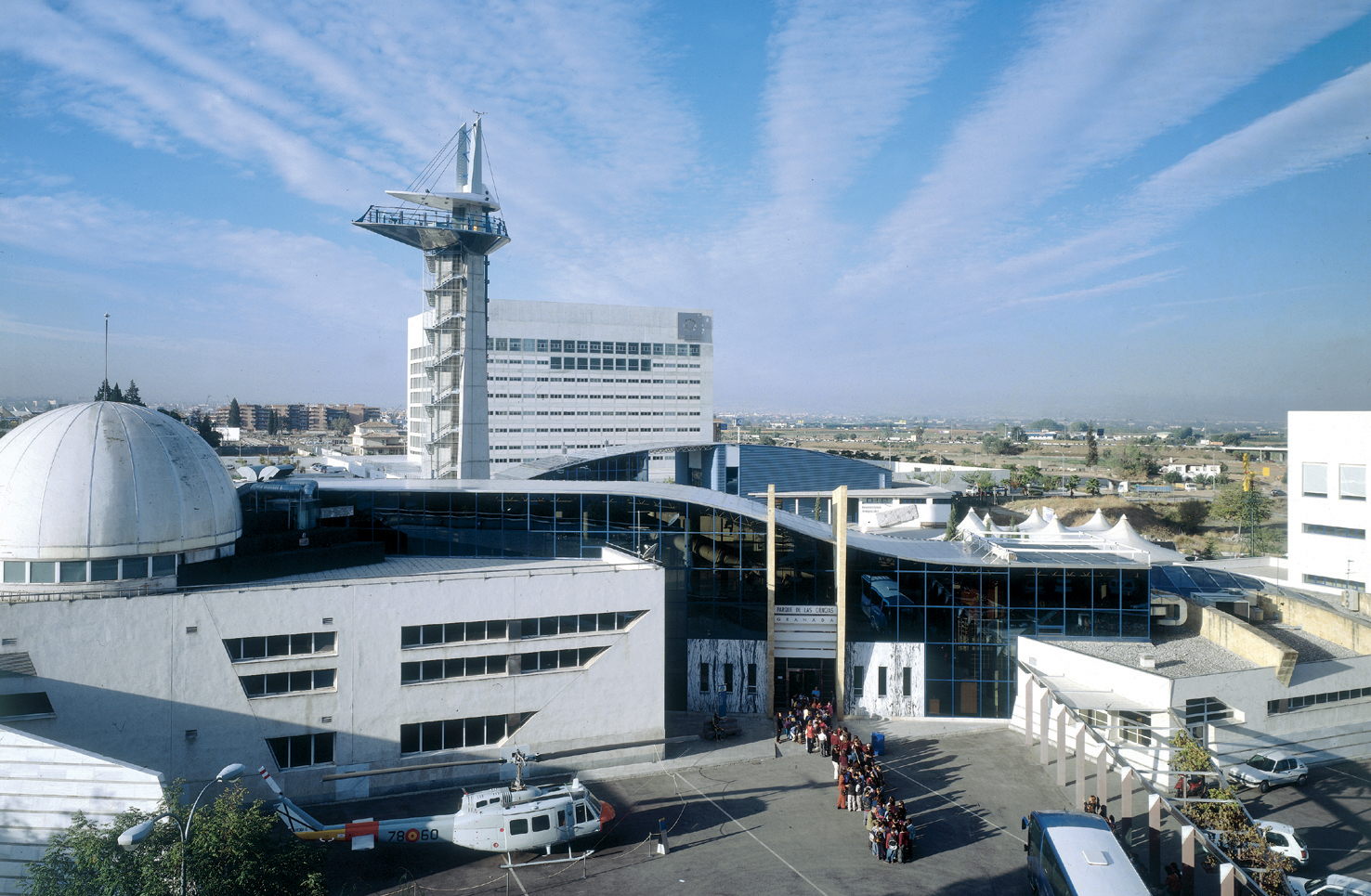 Vista general del Parque de las Ciencias, en Granada (España)